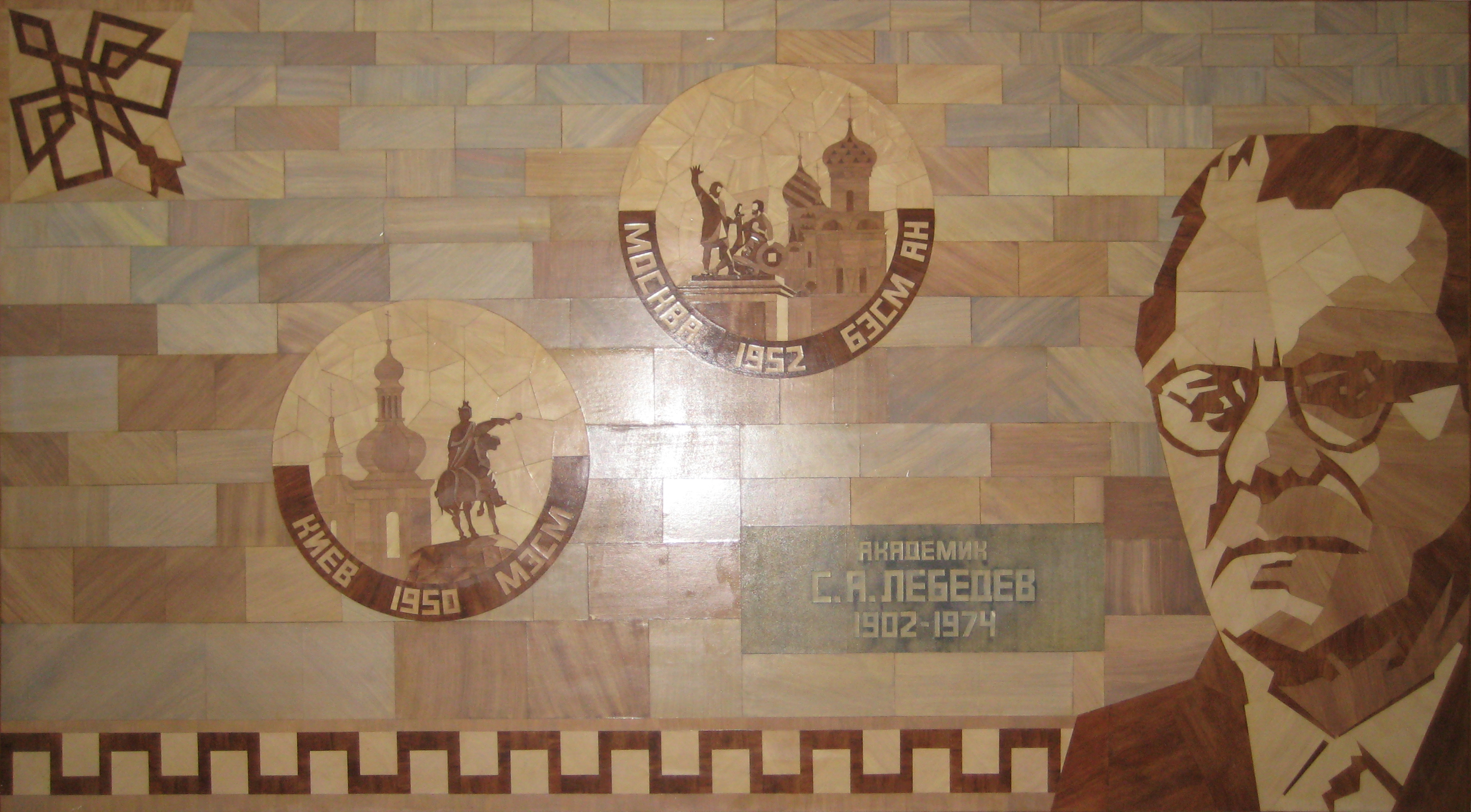 Фотография фрески с изображением Сергея Алексеевича Лебедева в ИТМиВТ